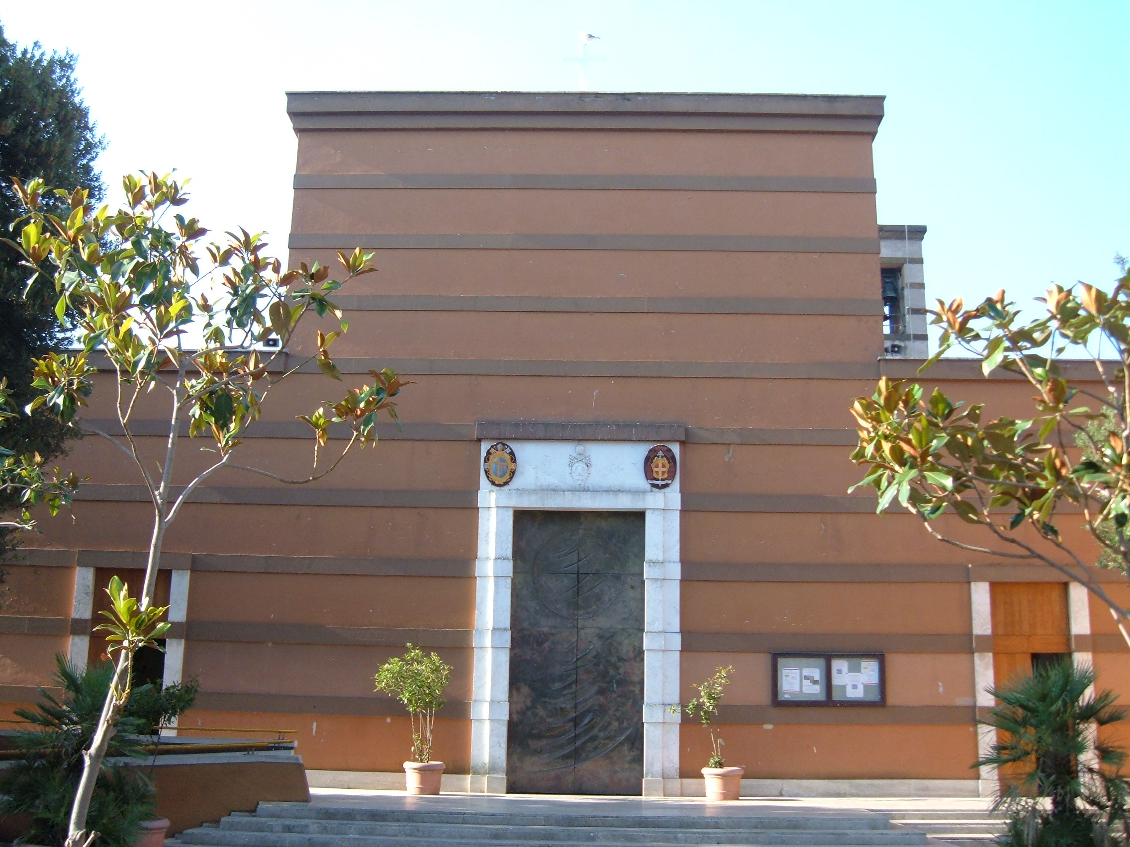 Chiesa della Trasfigurazione di Nostro Signore Gesù Cristo, a Roma, nel quartiere Gianicolense.